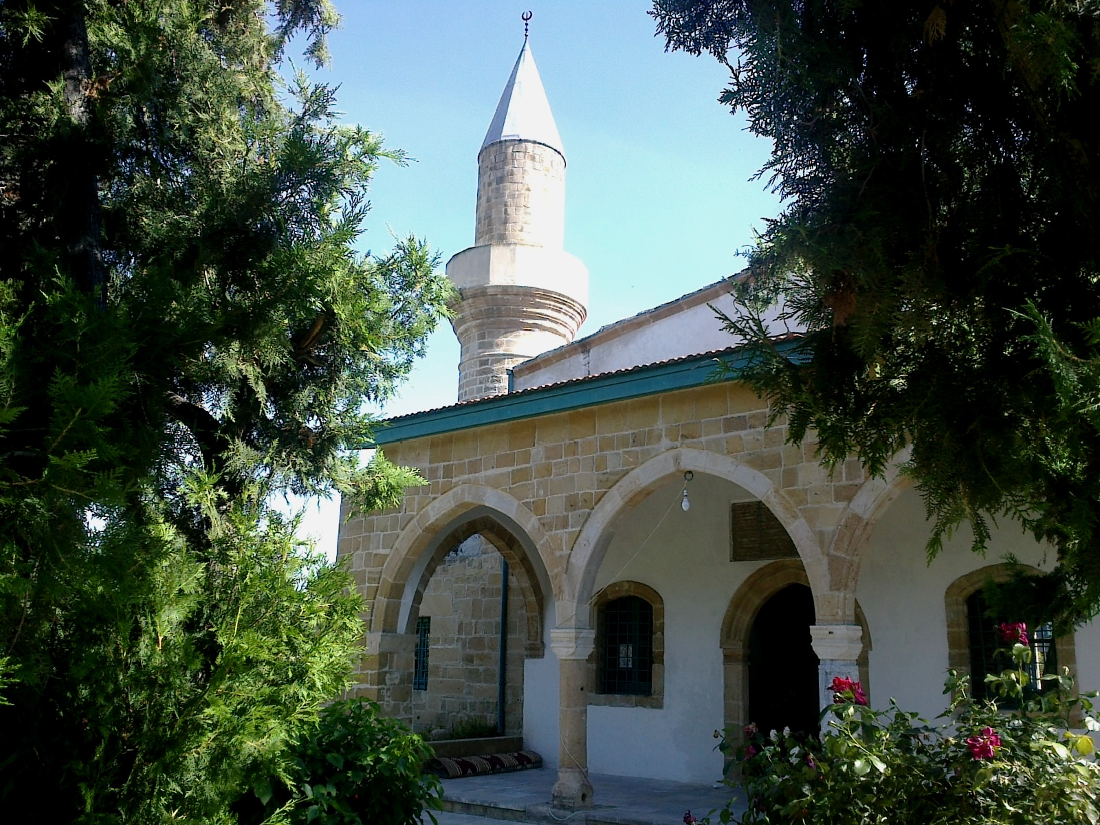 Chypre Nicosie Mosquee Bayraktar 14062014